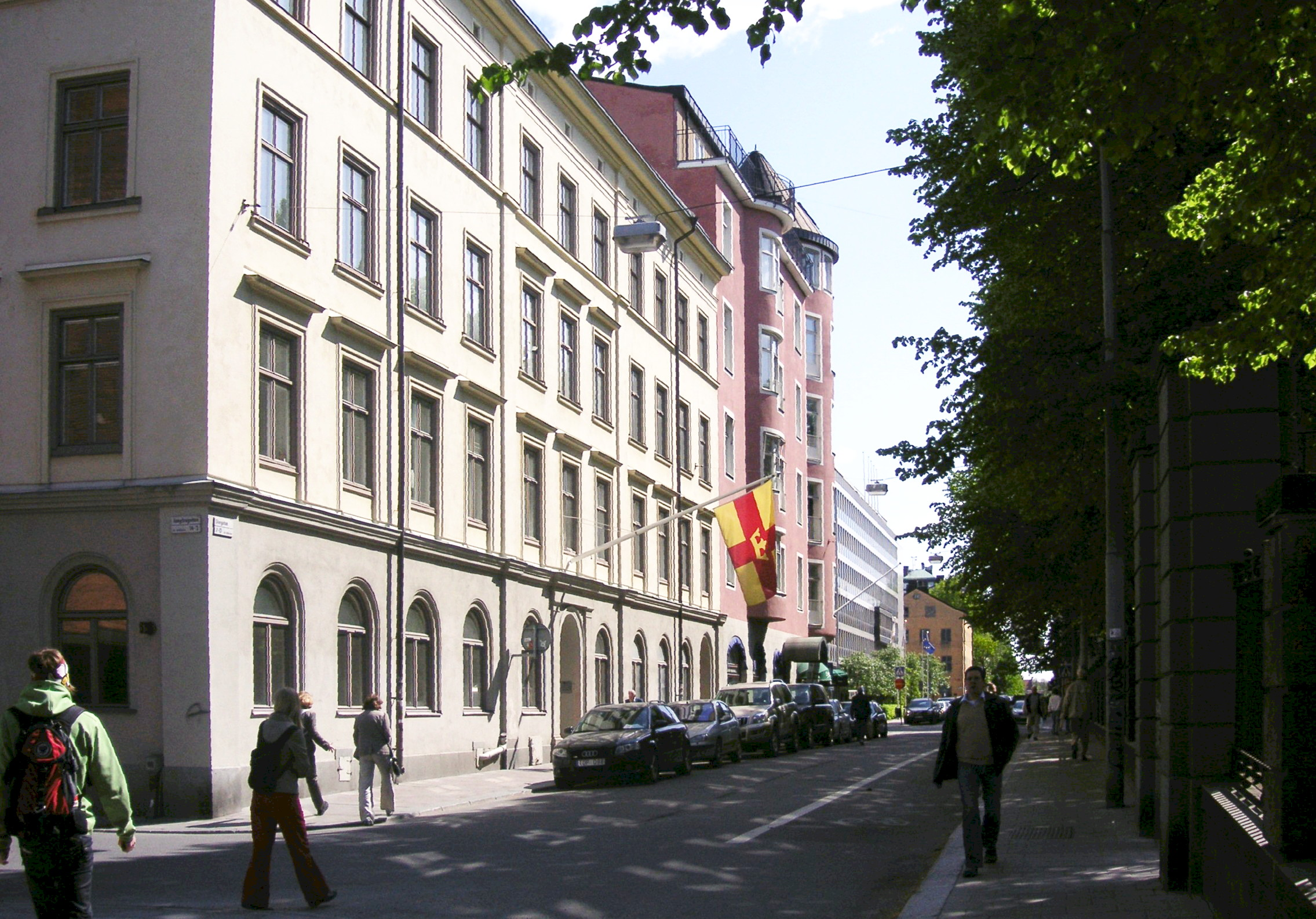 Storgatan in Stockholm. Närmast Storgatan 1 (Sjökalven 26), byggår 1856. Arkitekt J.F. Åbom.